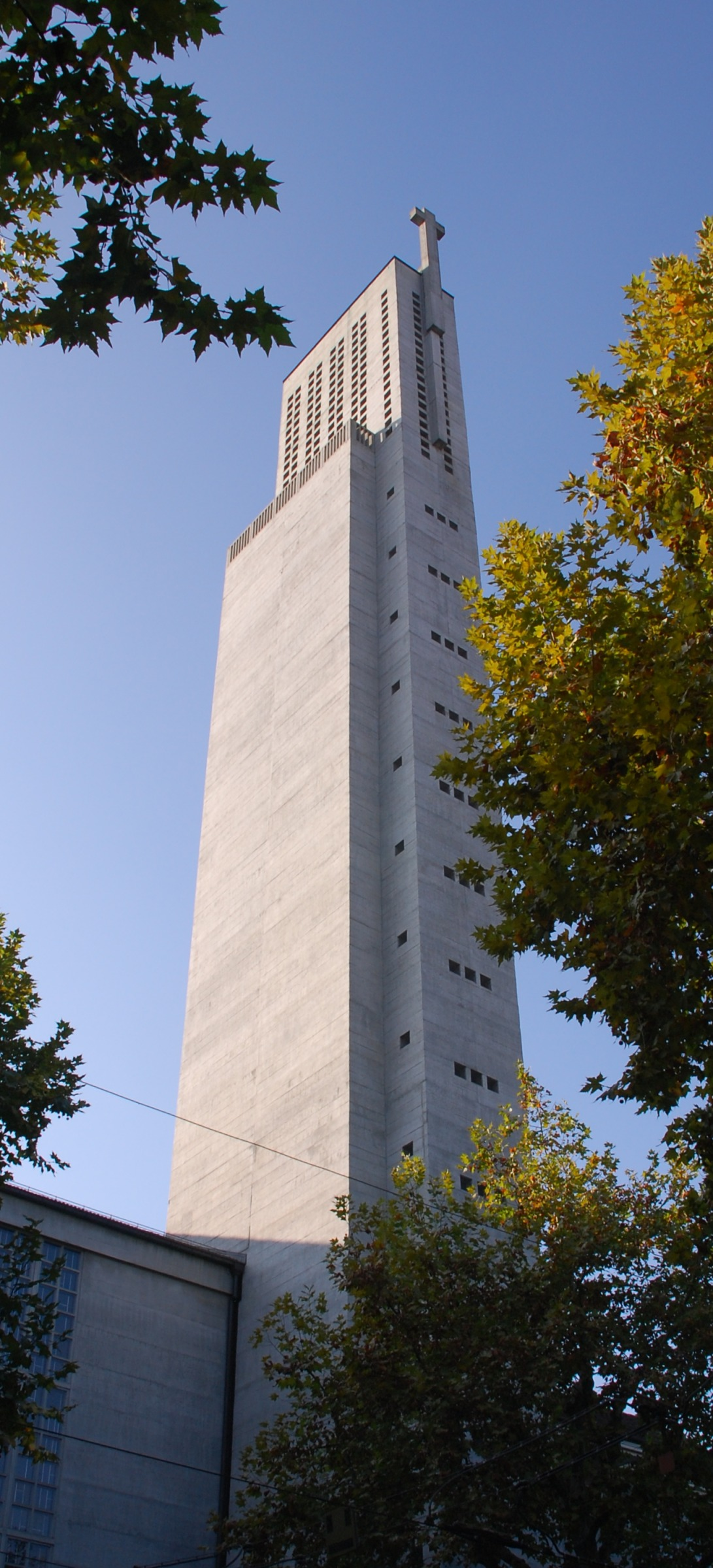 Turm der Antoniuskirche, Basel